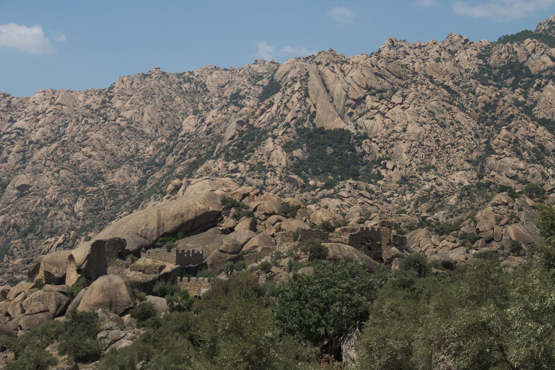 Латр. Монастырь Келливаров 4